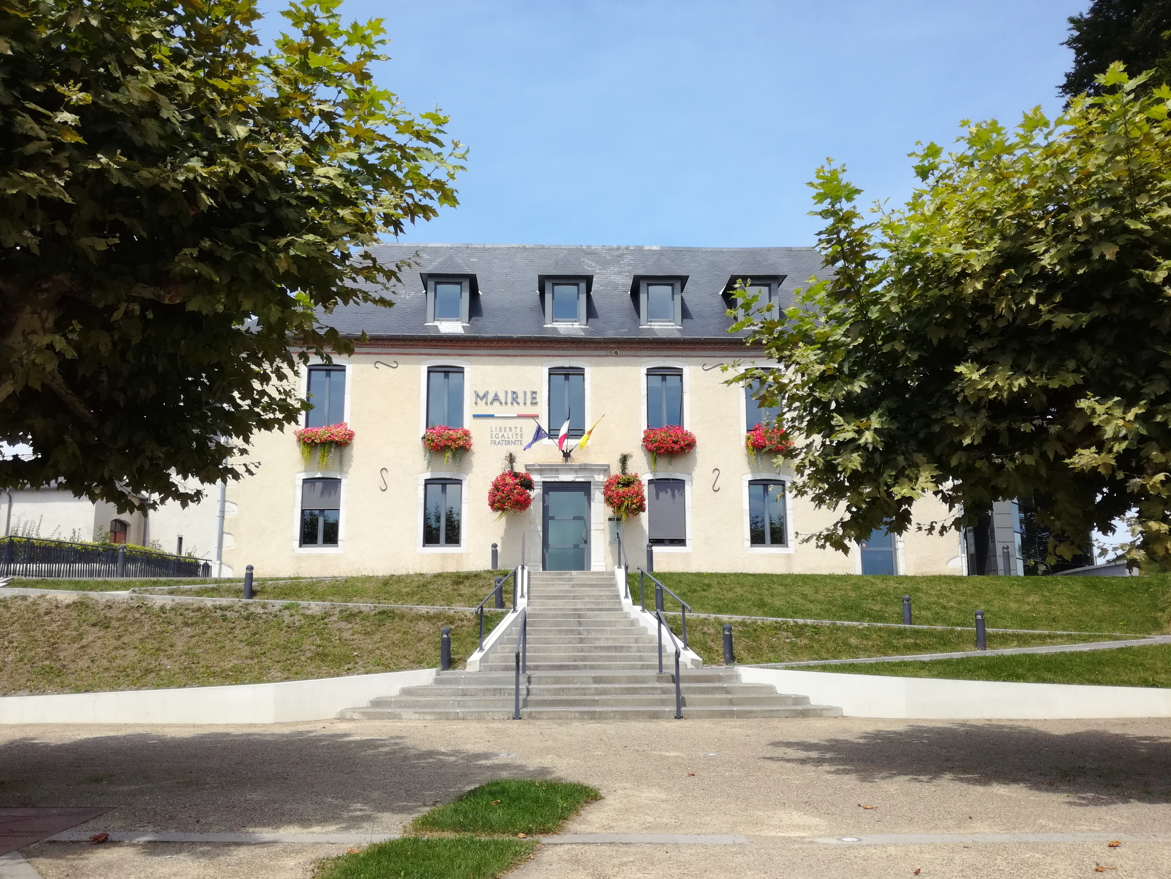 Photo de la Mairie de Serres-Castet